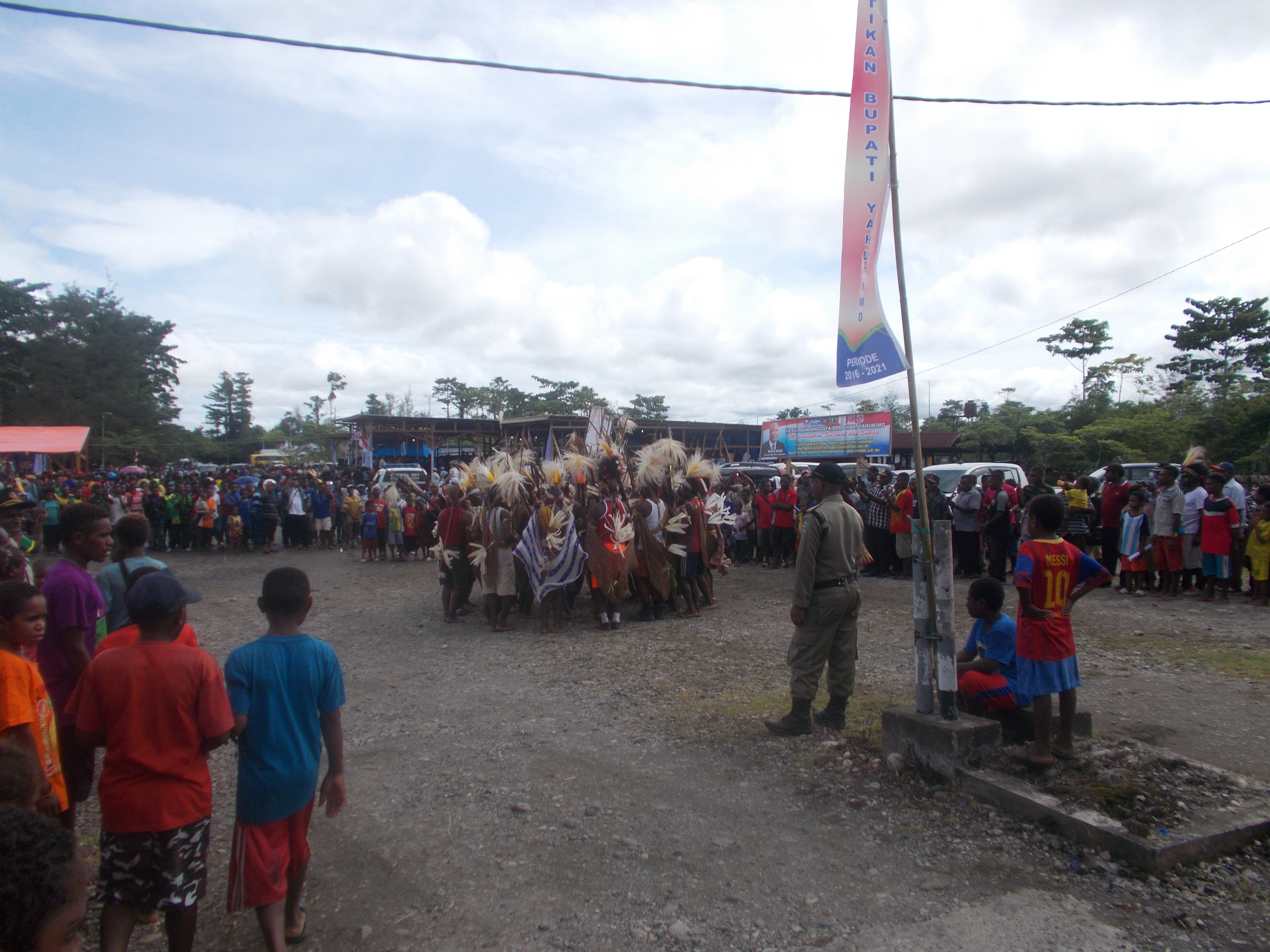 Fota Saat Kegiatan Pameran Budaya tingkat Kabupaten Yahukimo Tahun 2016